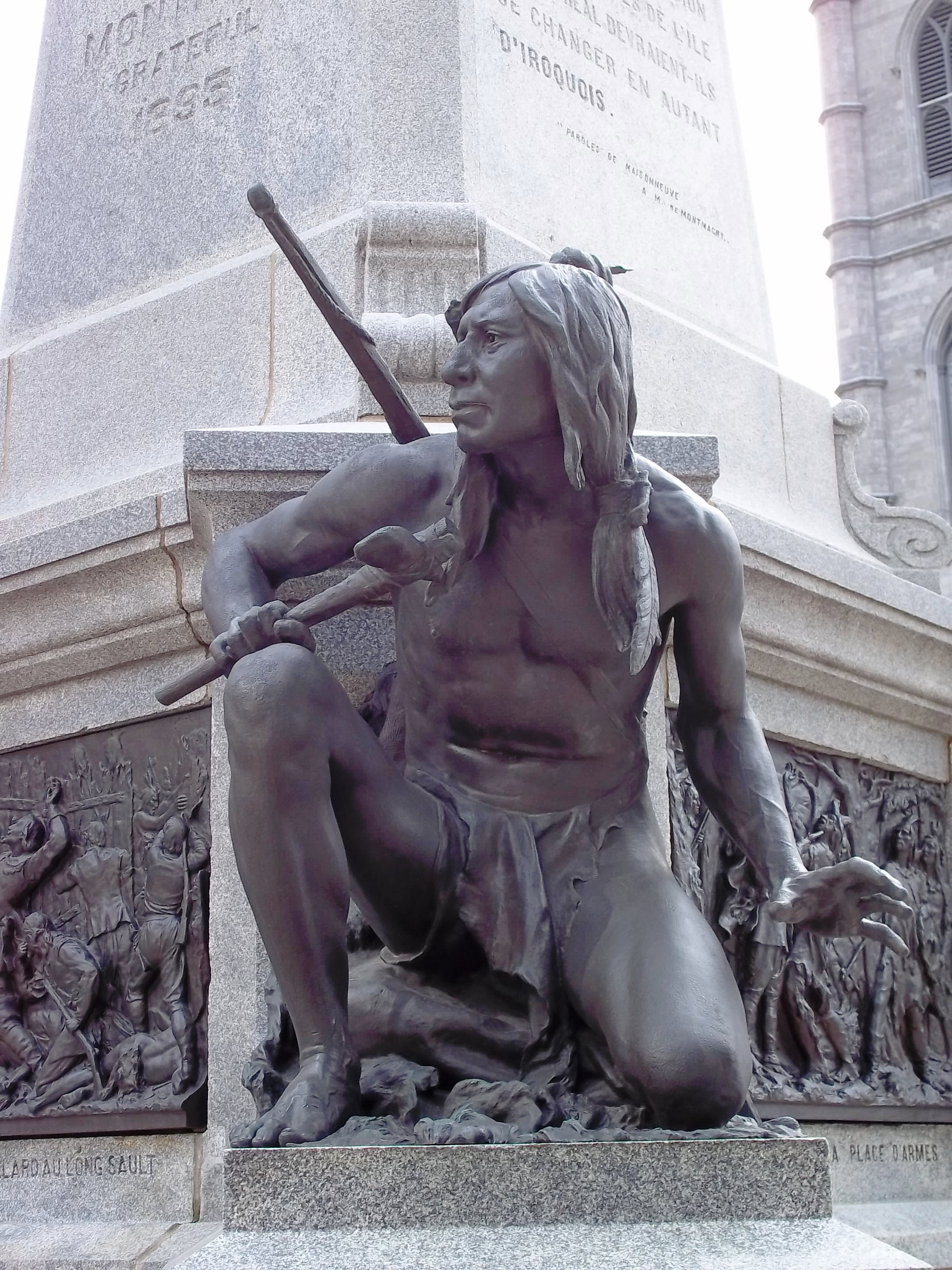 Iroquois du Monument à Maisonneuve, Place d'Armes, Montréal